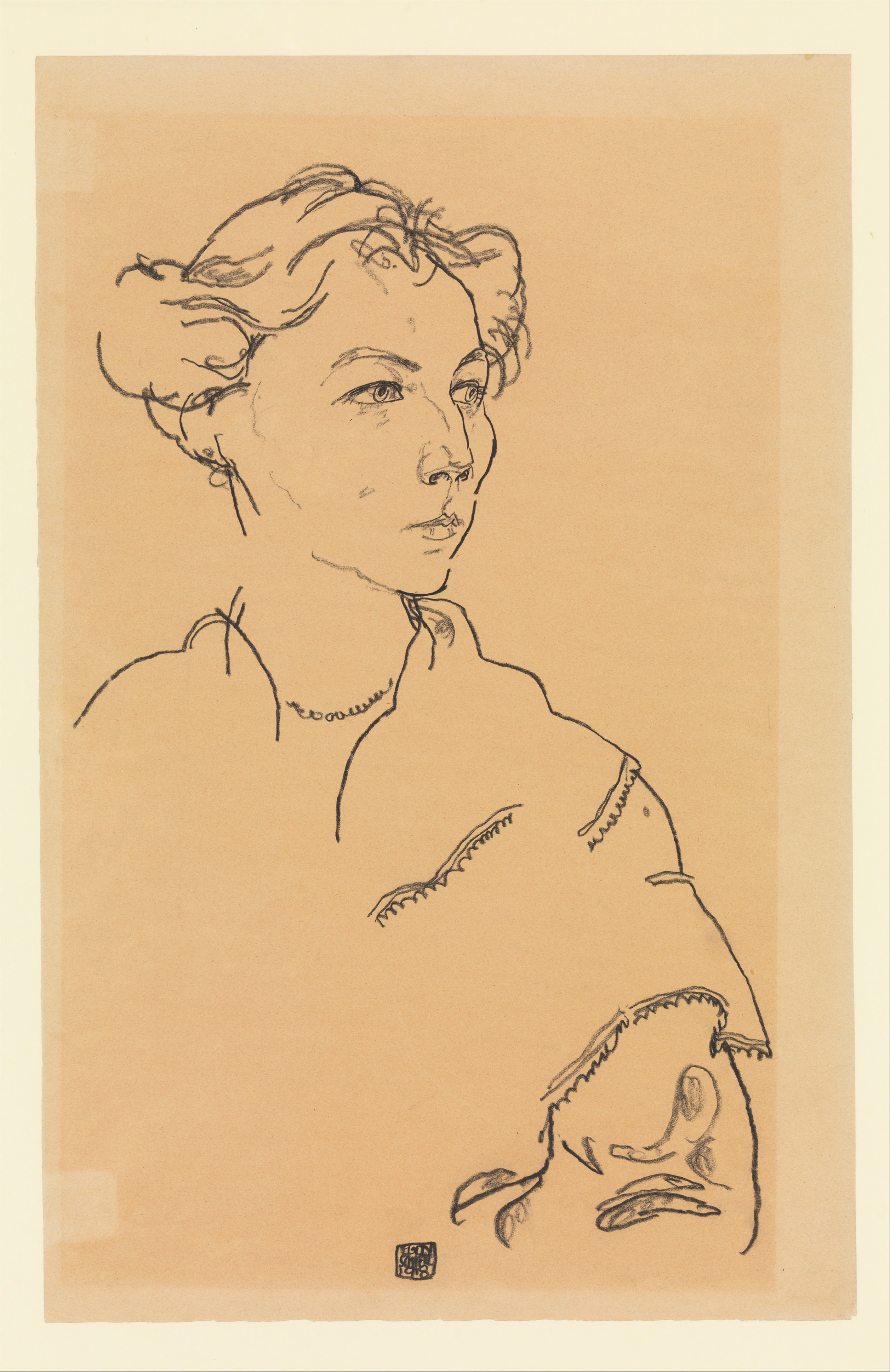 Drawing; Drawings